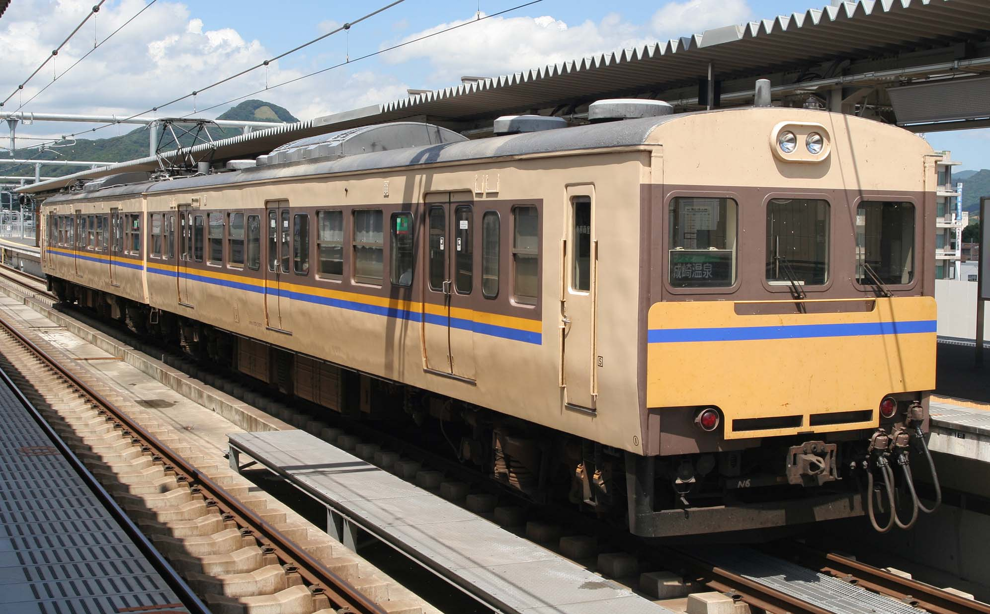 JR西日本113系電車 クモハ113-3811 先頭車化改造車 福知山駅にて撮影